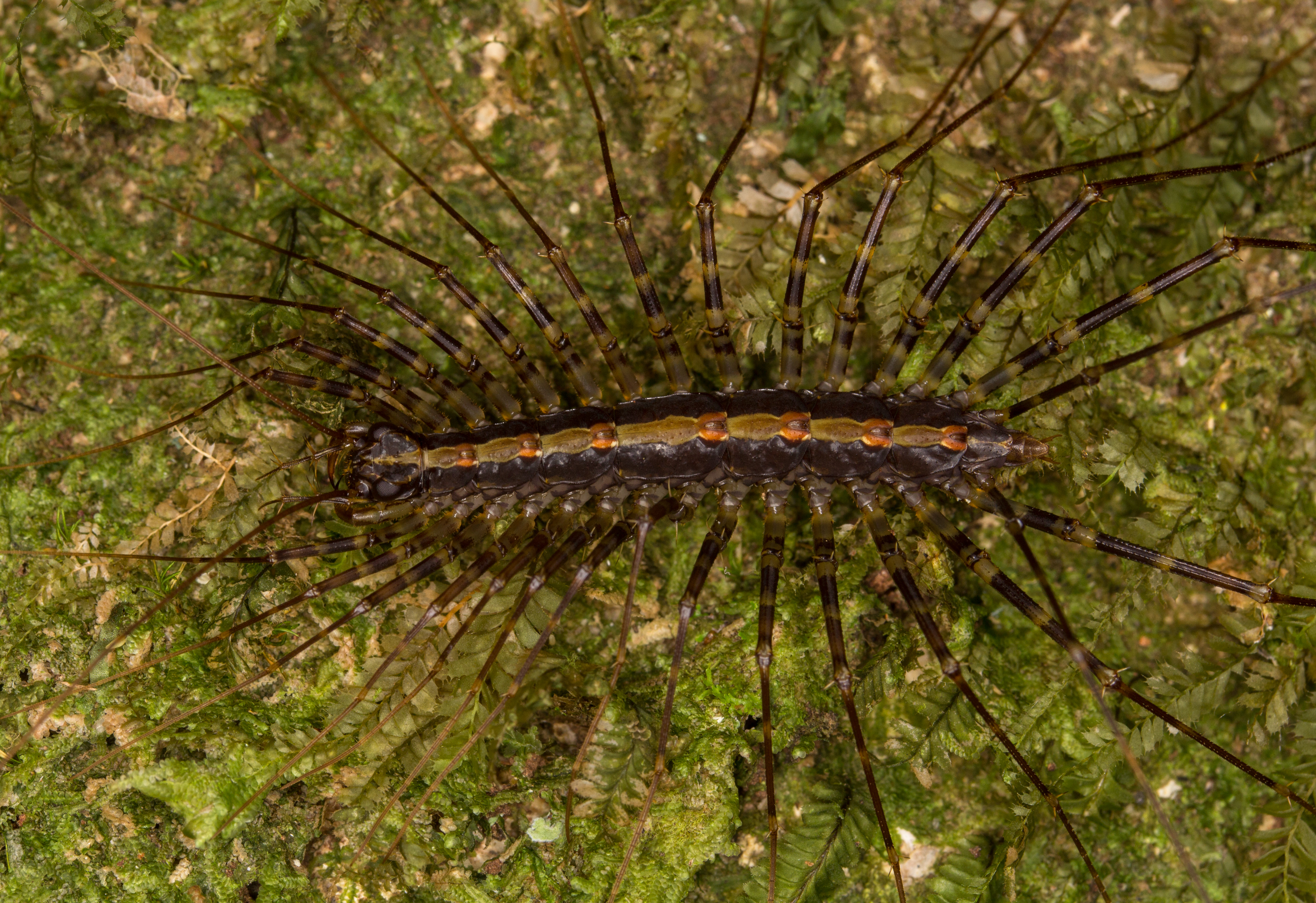 Sphendononema guildingii, Bosque Protector Colonso, Ecuador